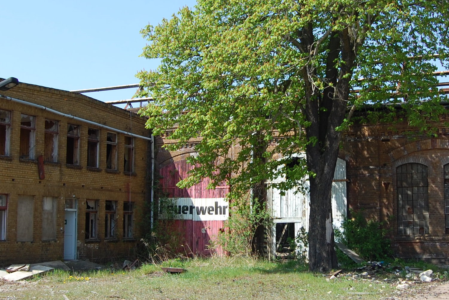 Bereich der ehemaligen Feuerwehr des RAW Salbke